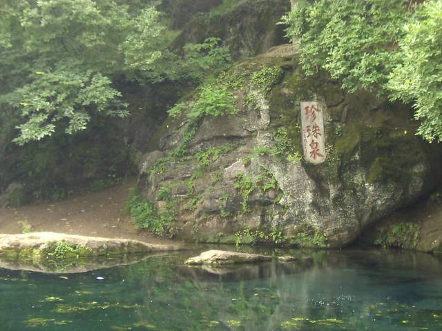 珍珠泉 2004年6月17日撮影 撮影者：権作 参照